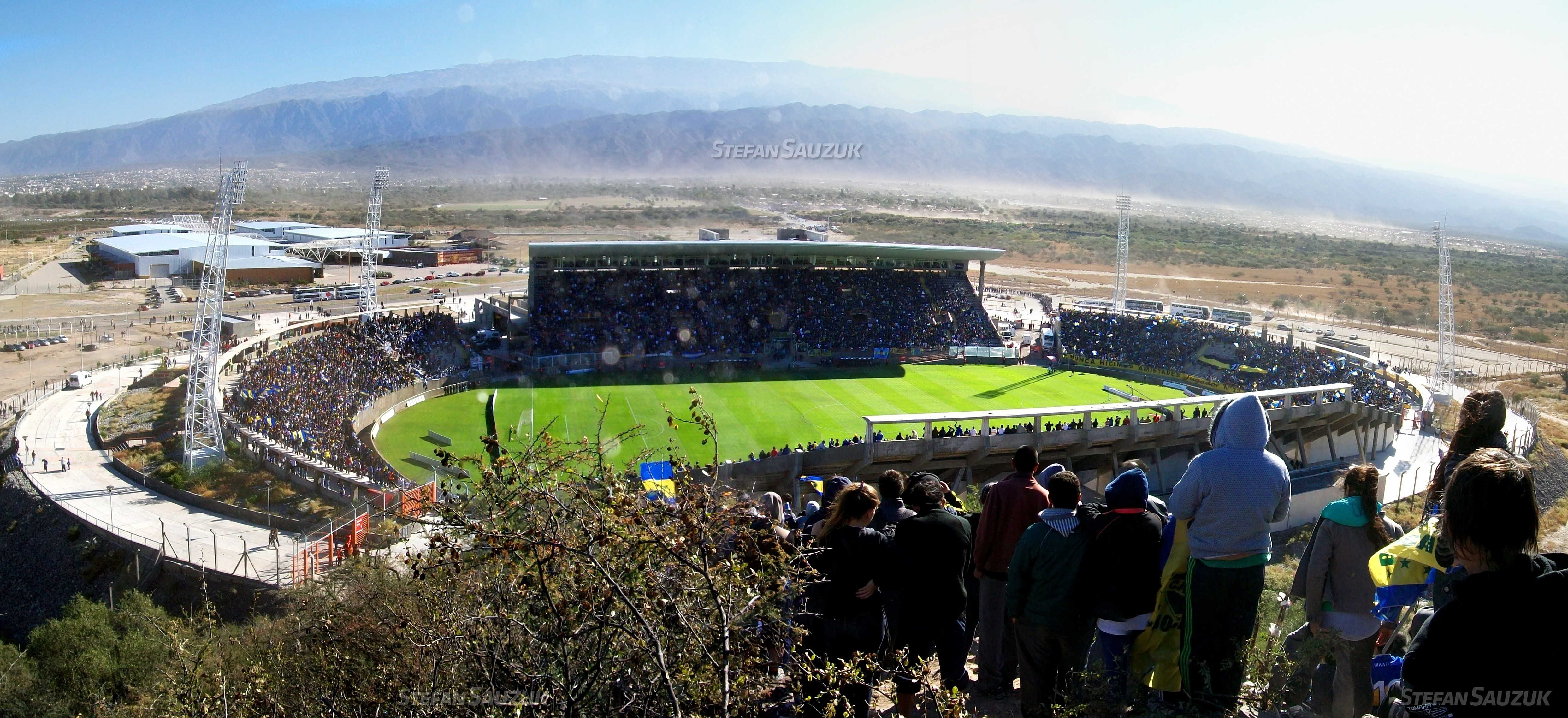 Estadio Bicentenario en su capacidad máxima. Semifinales de la Copa Argentina 2012. Boca Juniors vs Deportivo Merlo